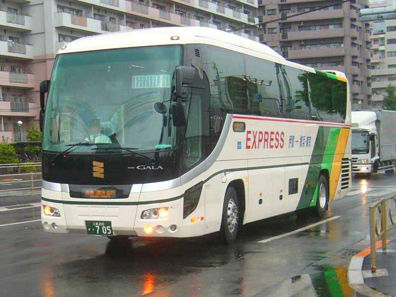 登録番号：三重200か・705 三重交通バス所属 いが号用 いすゞ・ガーラ PKG-RU1ESAJ